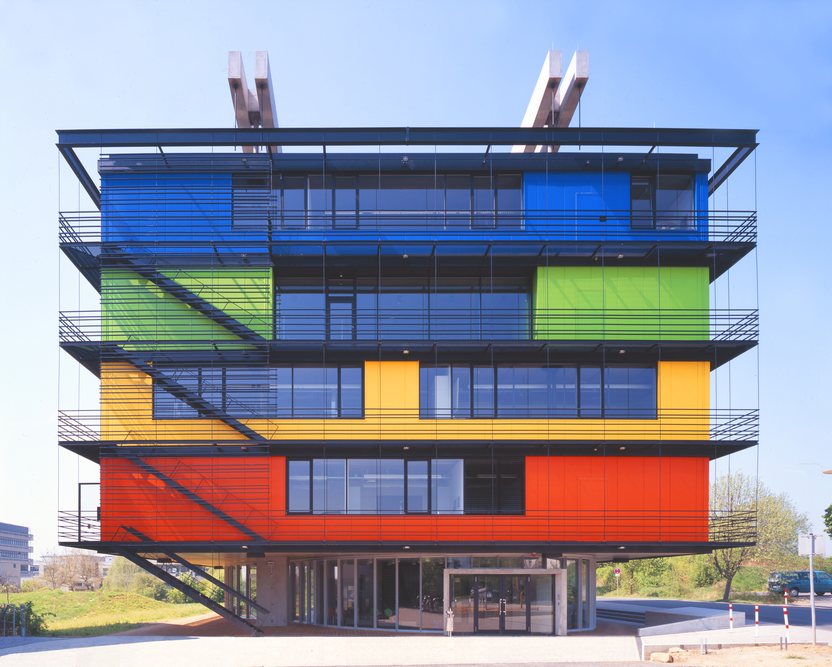 XLAB Außenansicht des Gebäudes. Architekten: Bez + Kock (Stuttgart)